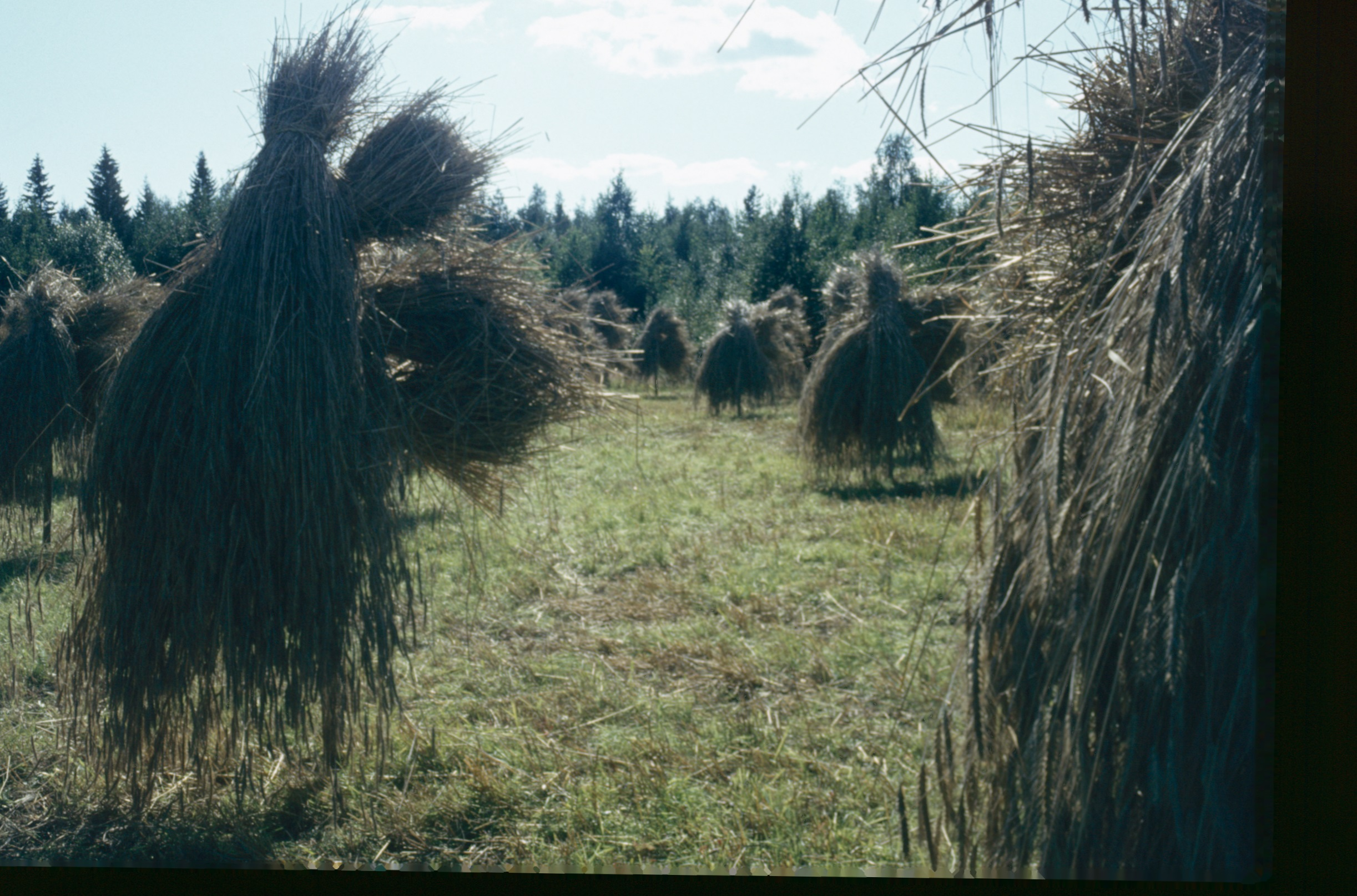 Kuhilaita lyhteitä, kuhilas, lyhde Pielavesi 1980